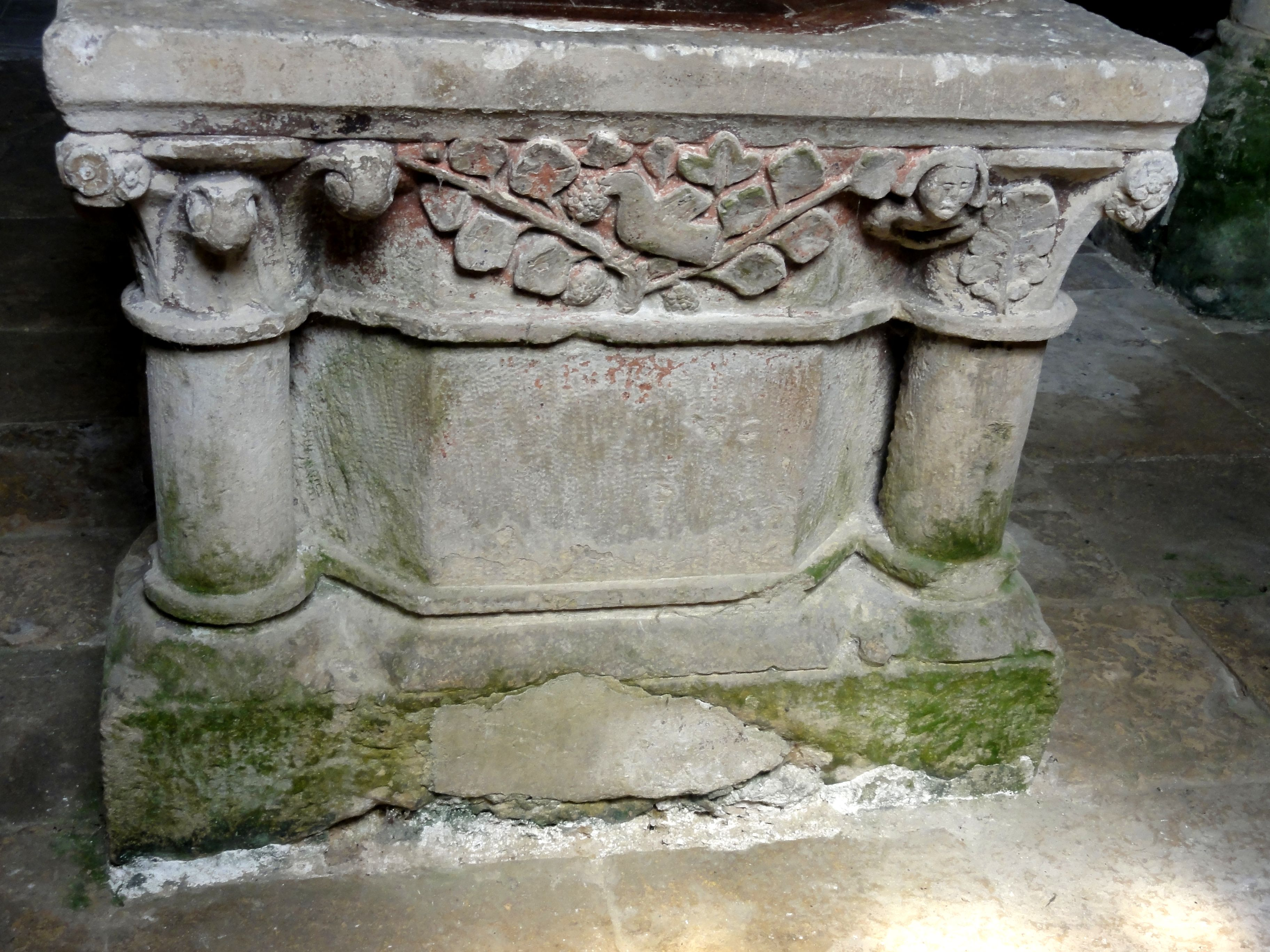 Fonts baptismaux.